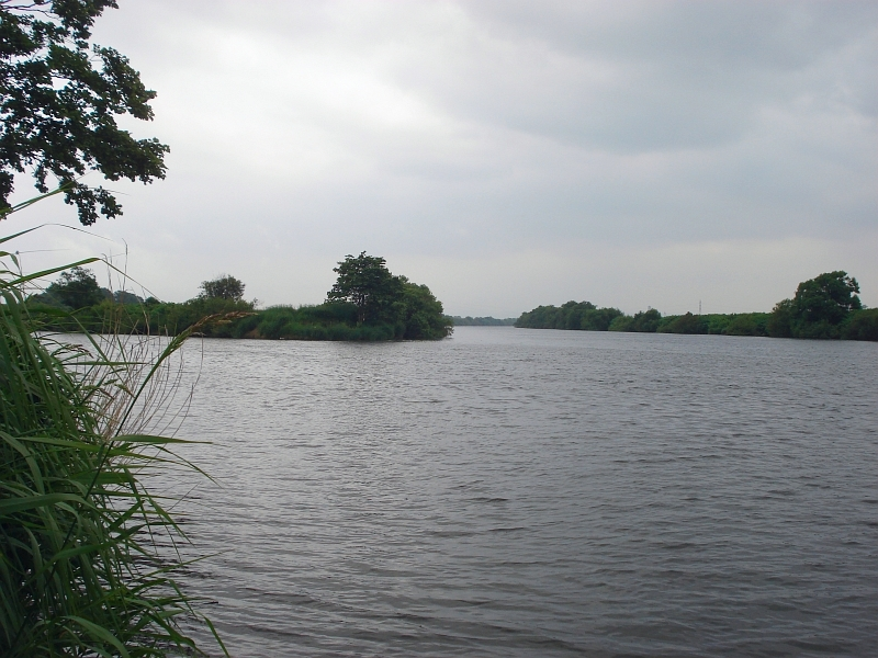 北海道・札幌市南区・清田区・厚別区・白石区・江別市を流れる厚別川。豊平川との合流地点（川の末端）